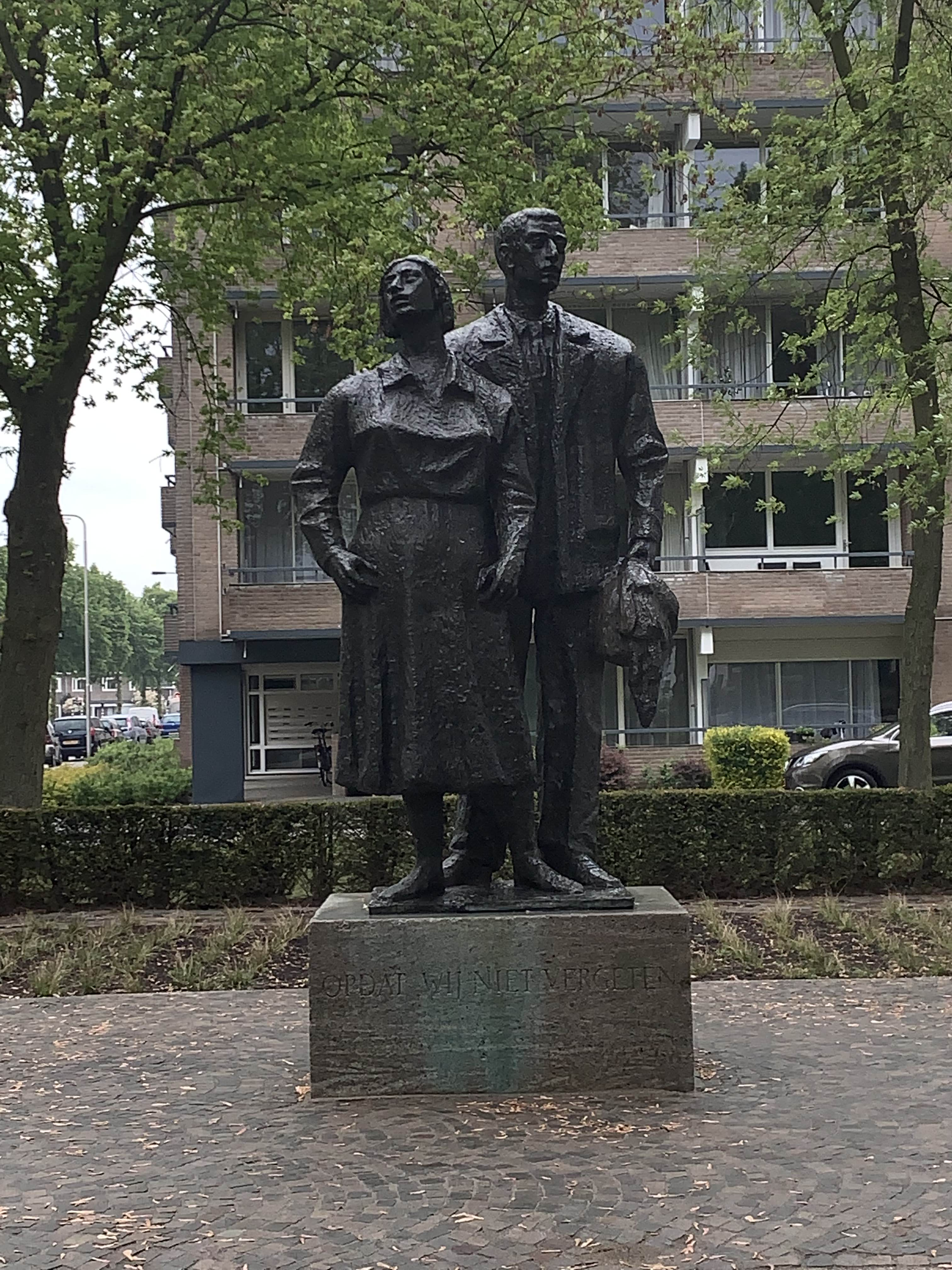 Vooraanzicht van het Oorlogsmonument aan de Nieuwe Hescheweg.